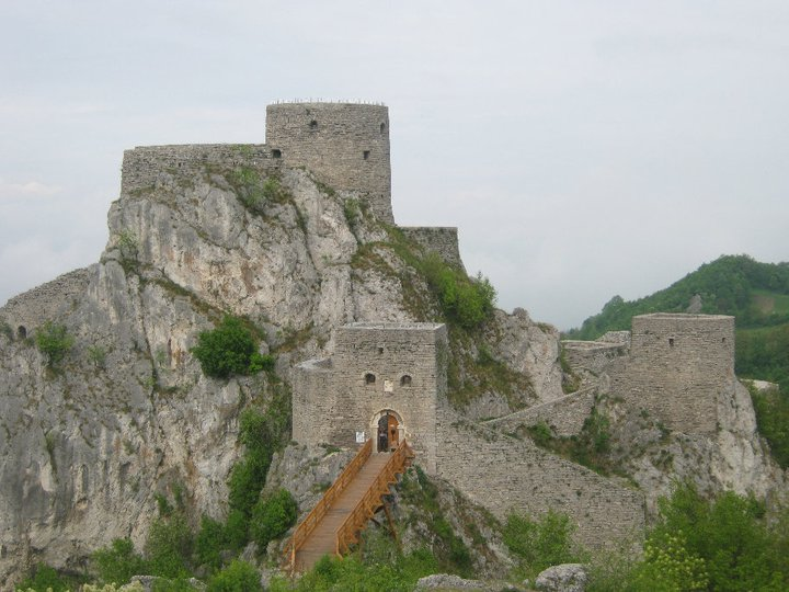 Srednjovjekovna kula u Srebreniku